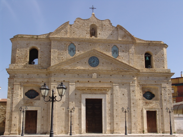 La Chiesa Madre, Cuto.